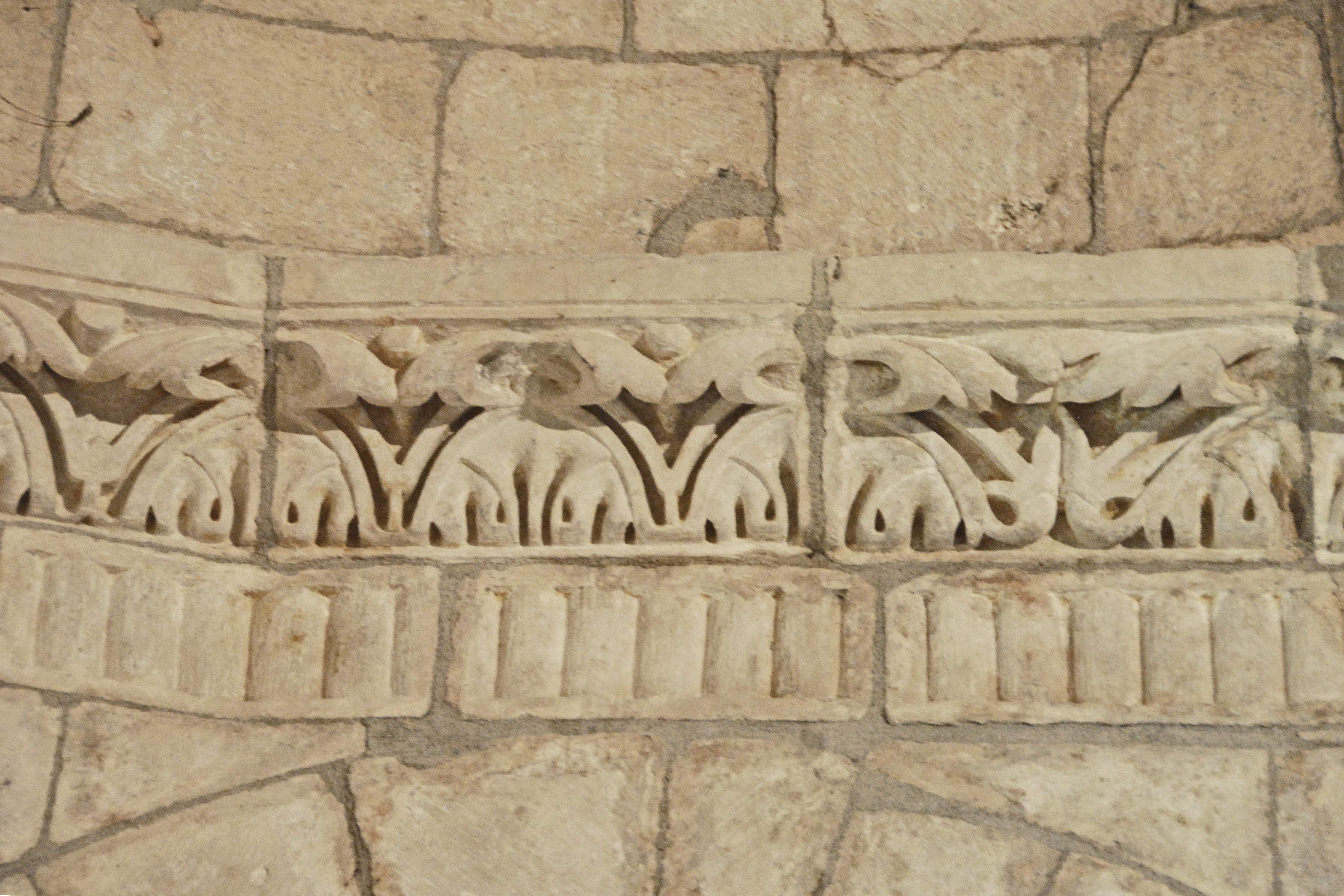 N-D et St-Christophe de St-Christol, Chorapsis, Kranzgesims